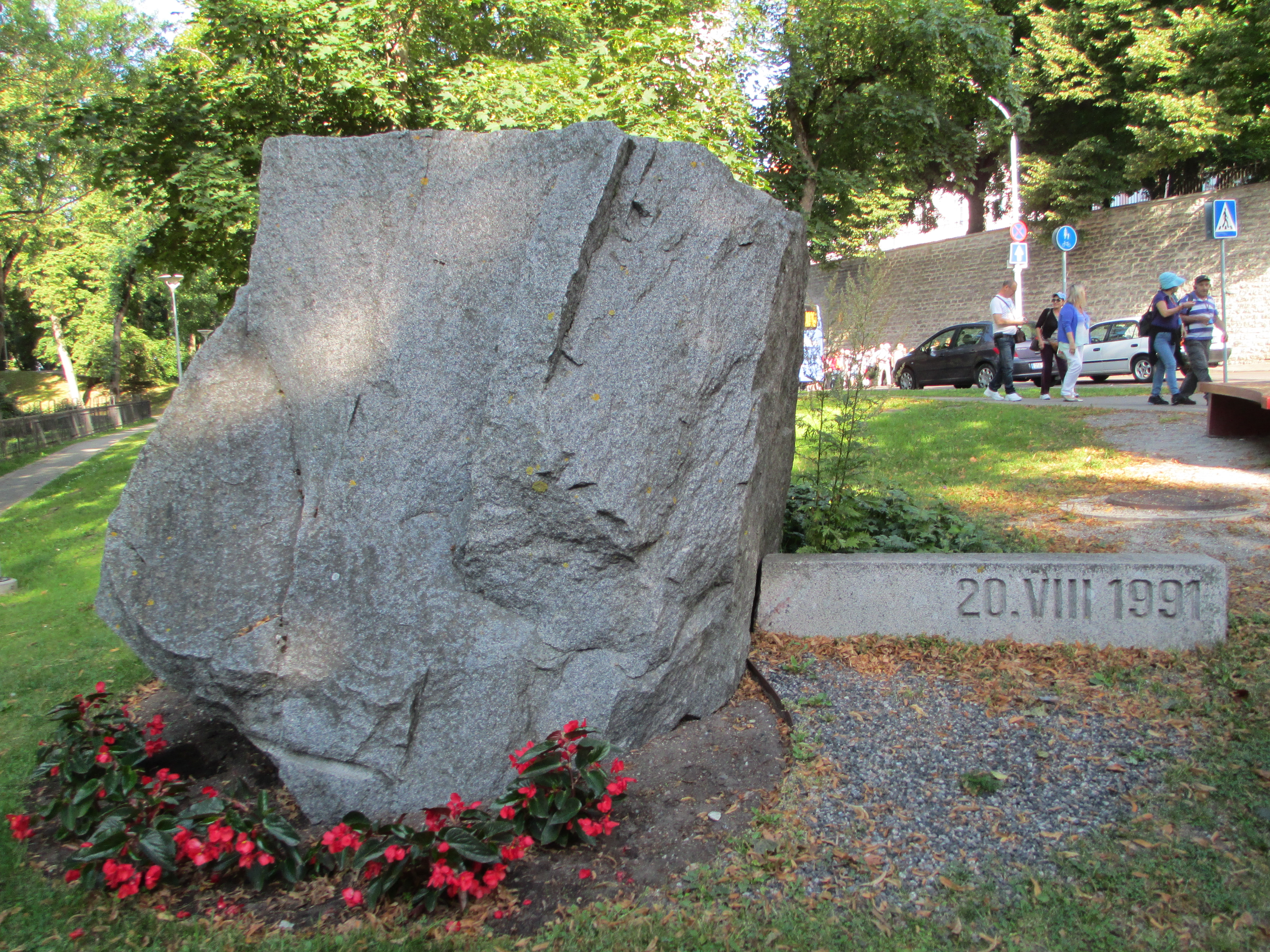 סלע זיכרון בטאלין לעצמאות אסטוניה